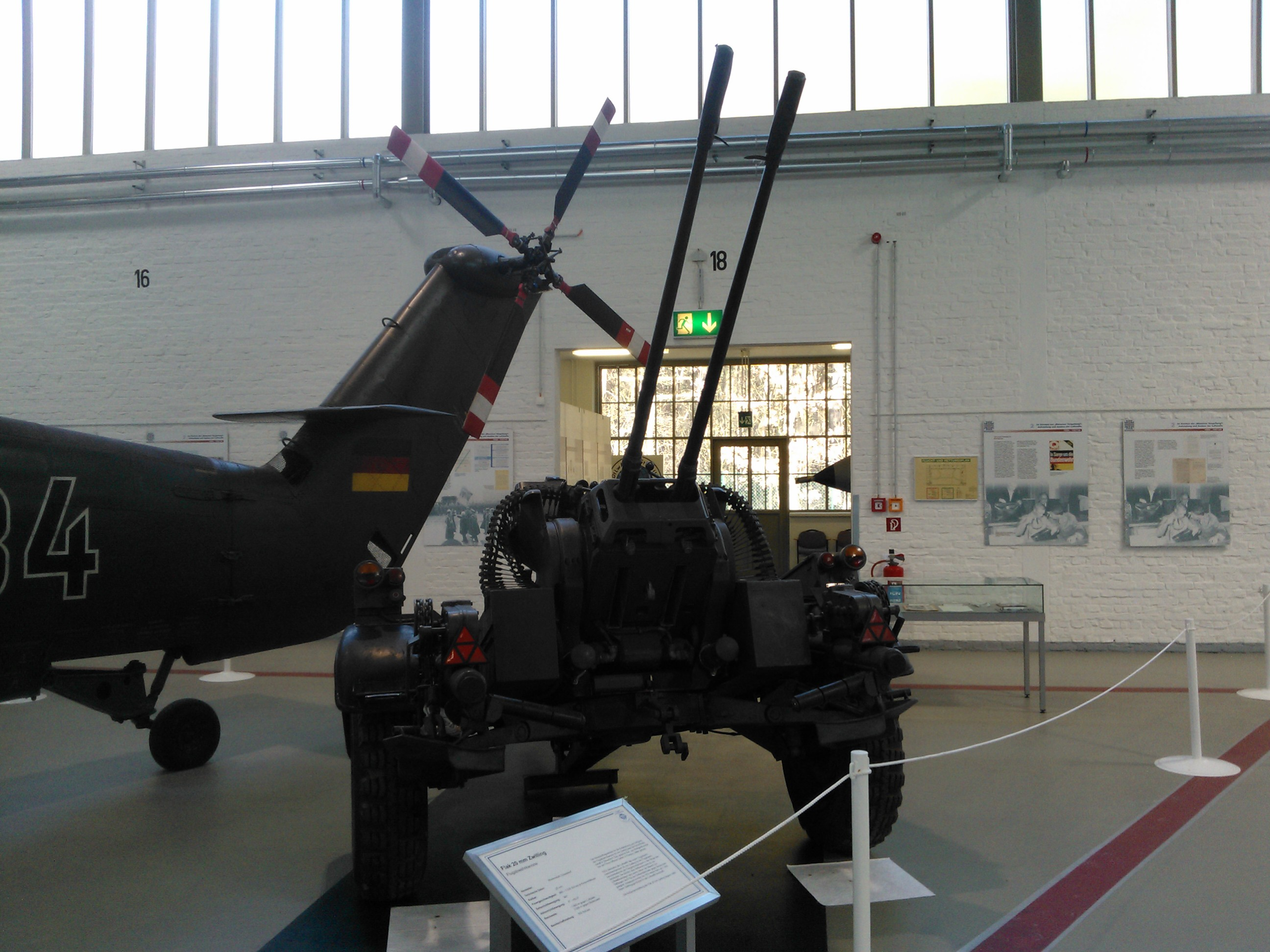 ab 1972 Bundeswehr, in Berlin Gatow